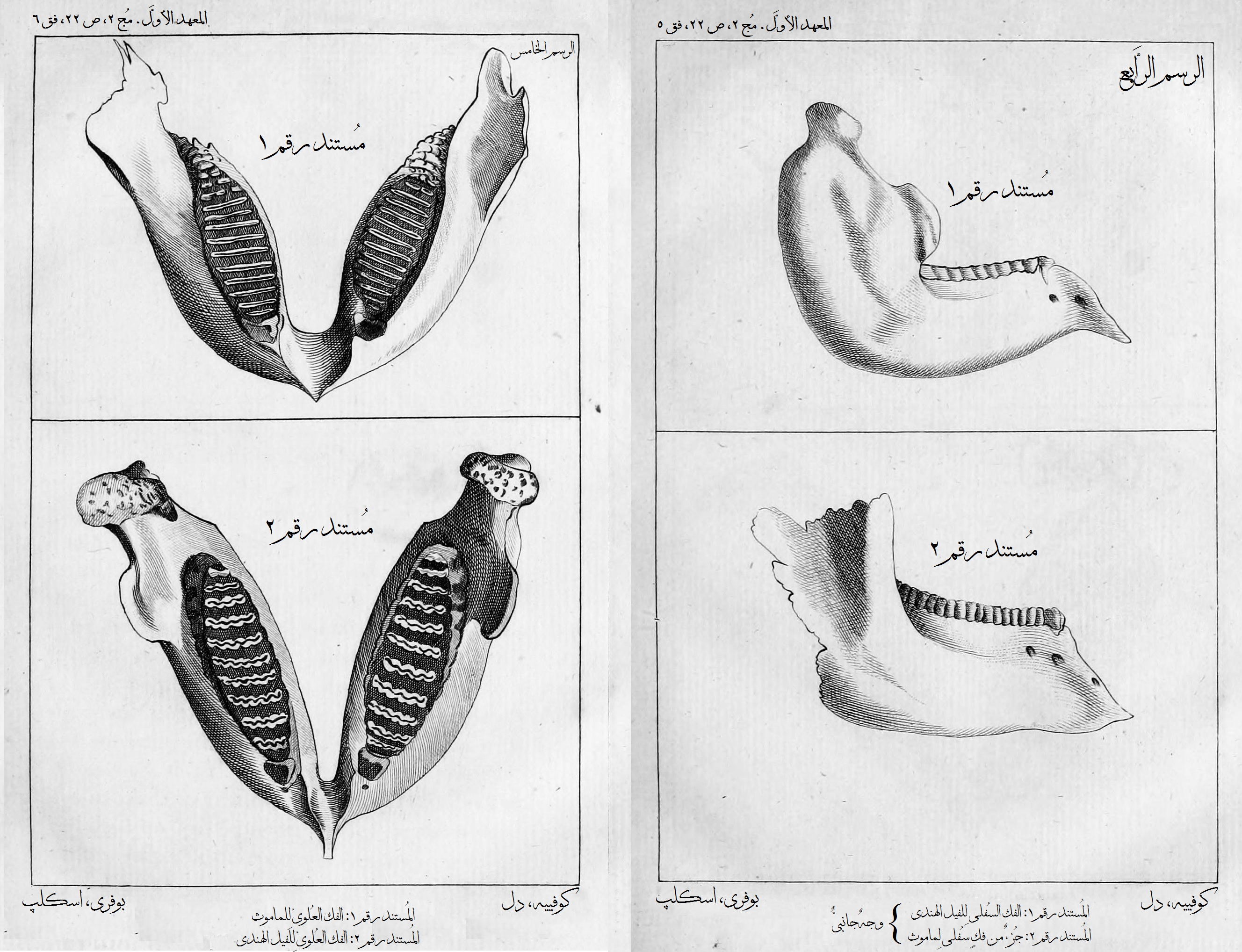 نسخة مُعرَّبة لِلرسم البياني الذي وضعه العالم الفرنسي جورج كوڤييه في دراسته لِسنة 1798-99م، عن الأفيال الباقية والمُنقرضة. ويظهر فيه فك فيلٍ هندي ومُستحاثة فك ماموث.